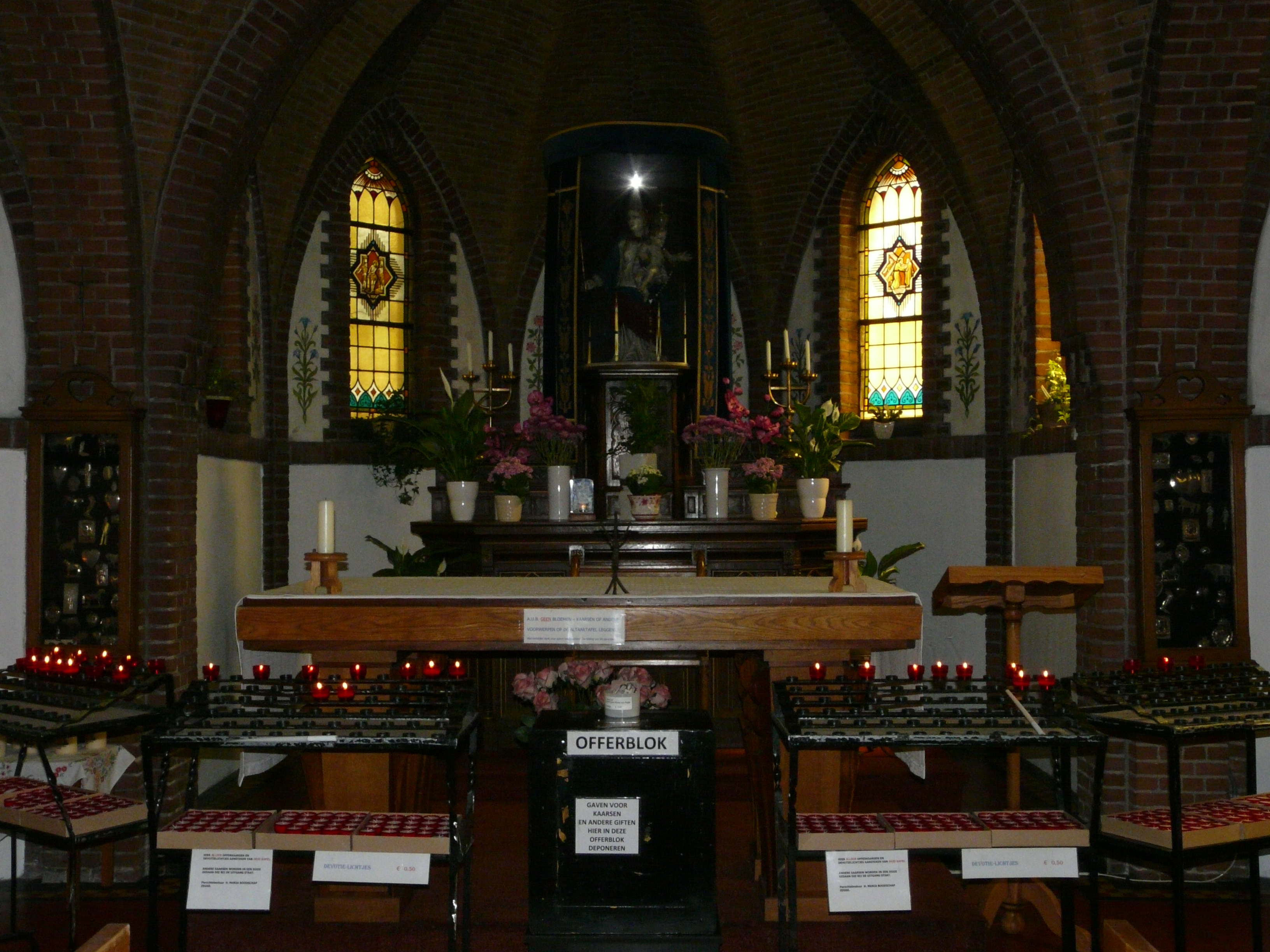 Zicht op een deel van het interieur van de O.L. Vrouw van Zegge kapel in Zegge